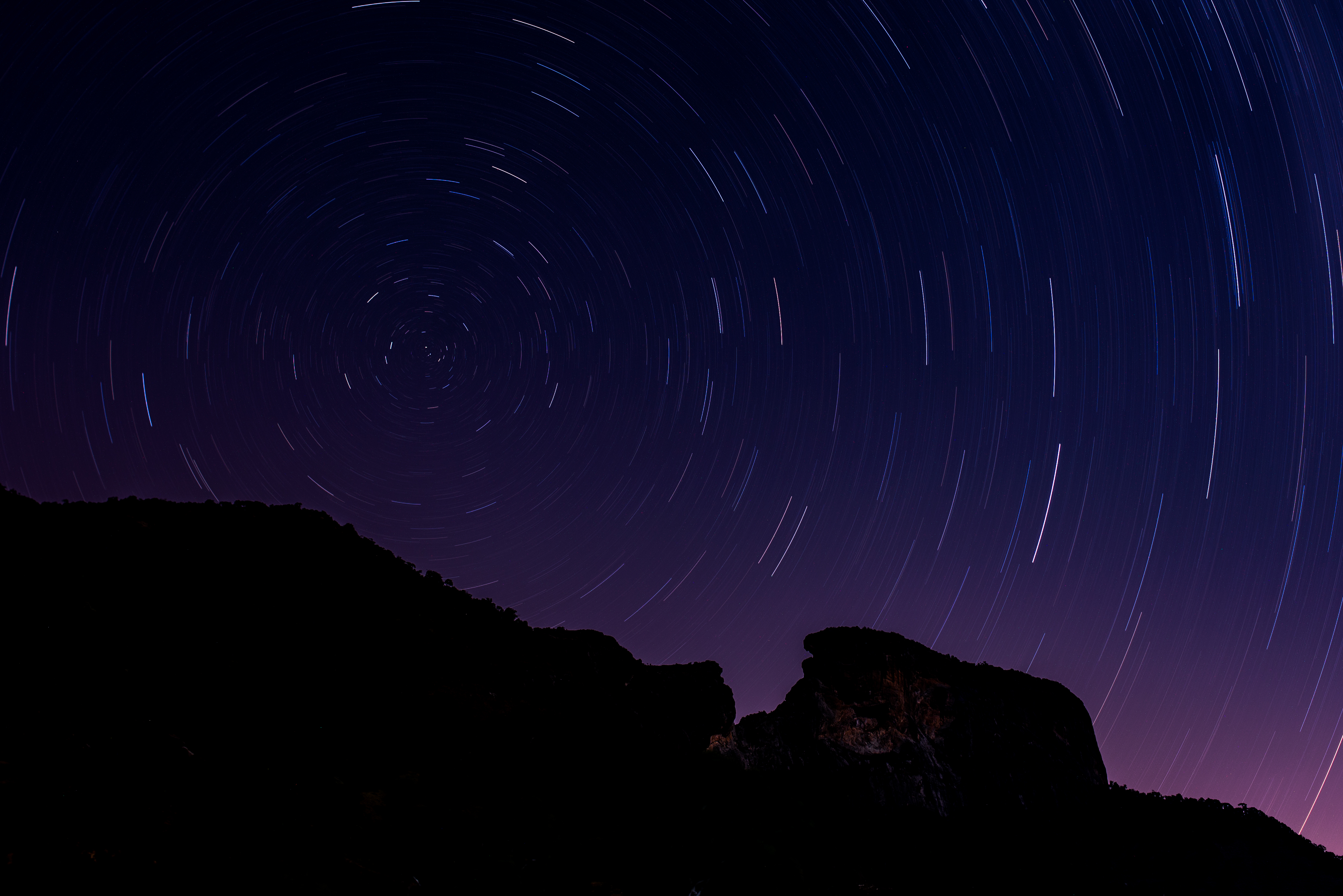 Rotação aparente do céu noturno permitindo identificar o Polo Sul Celeste (no centro da rotação). Foto feita no município de São Bento do Sapucaí - SP.